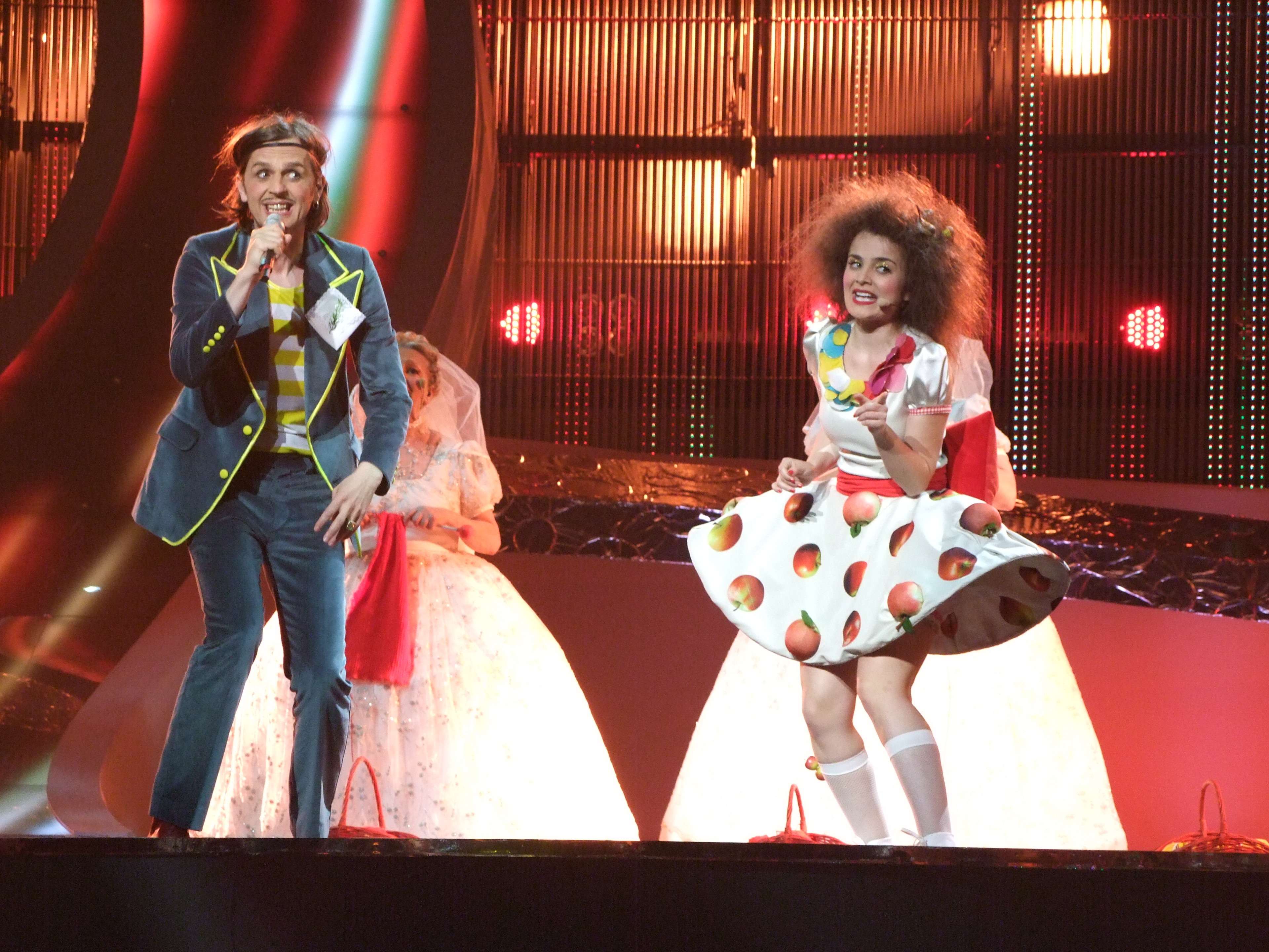 Eurovision Song Contest 2008, 1st semifinal Bosnia and Herzegovina: Laka - Pokusaj